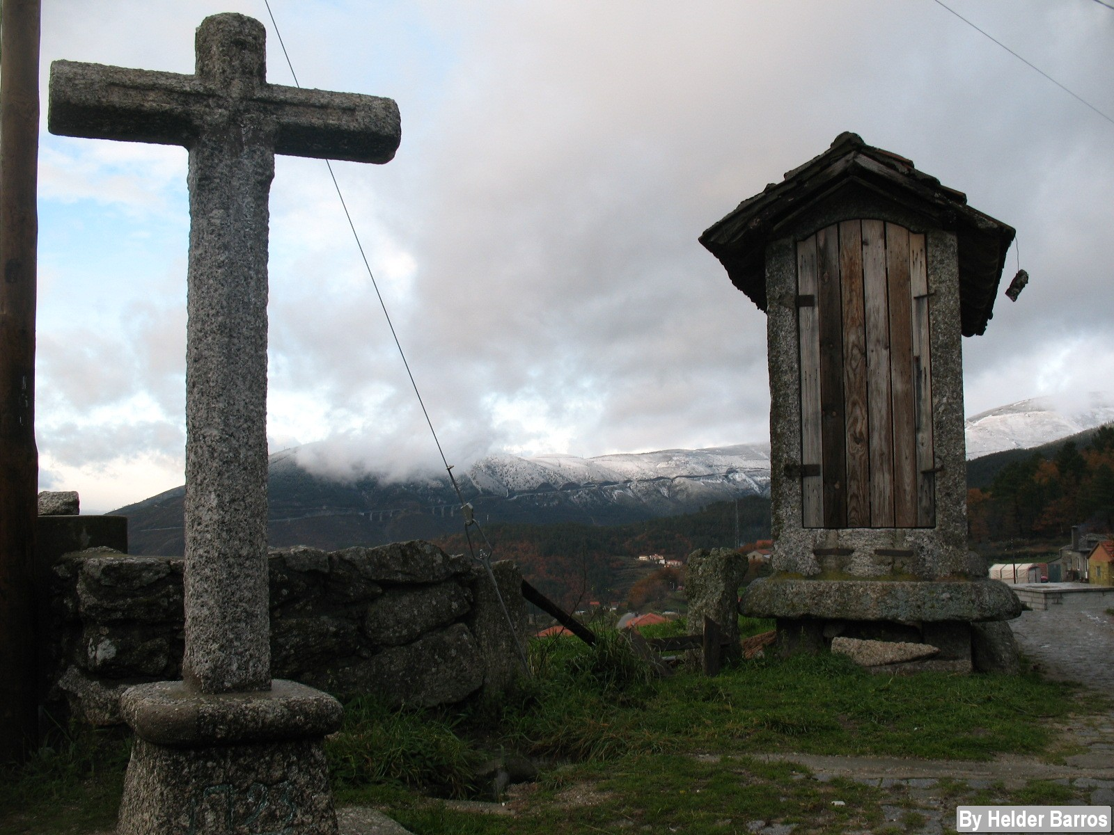 Amarante Candemil Murgido Espigueiro